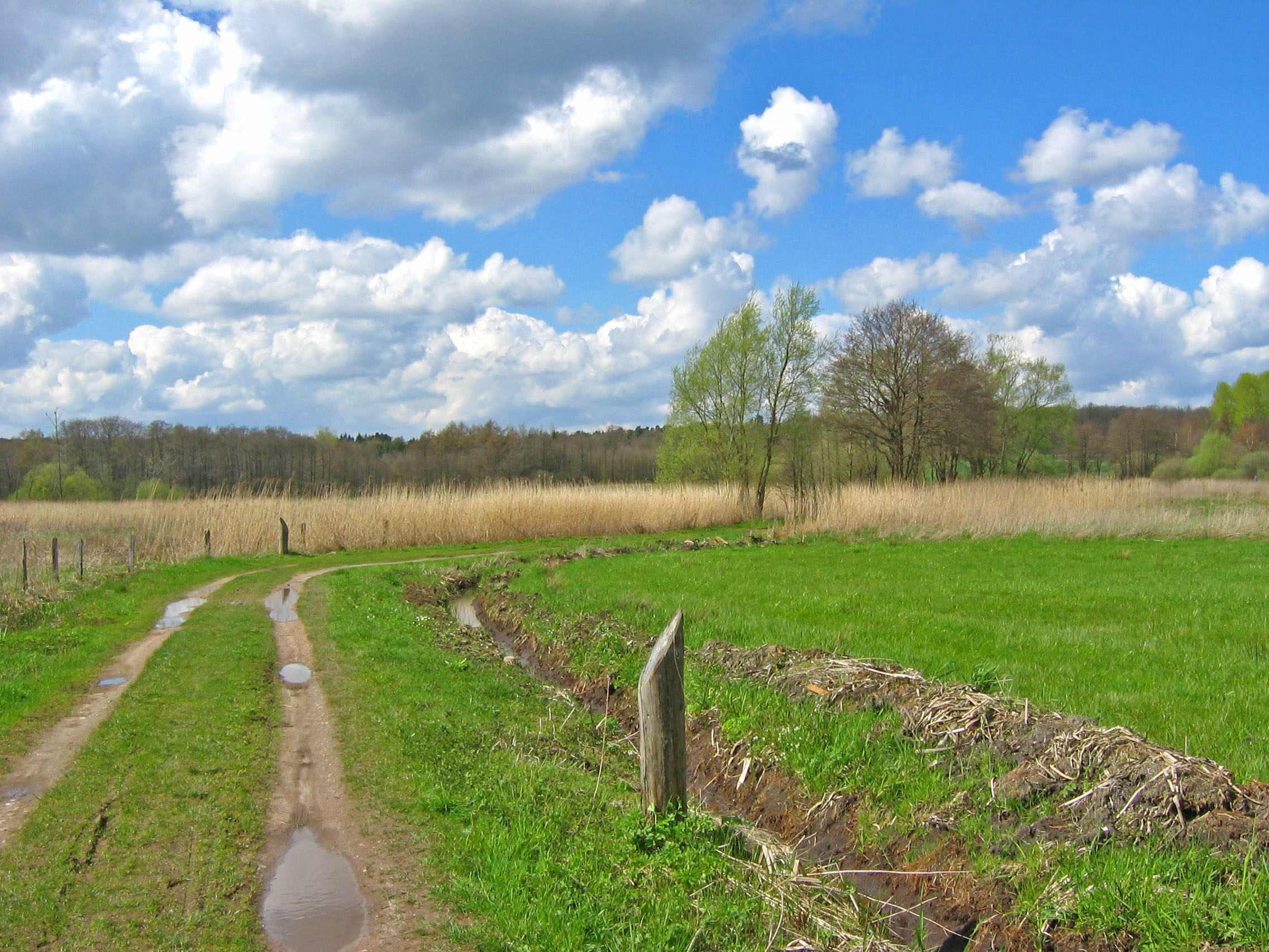 Bliedersdorf. Way to the river Aue Spring 2006 - Weg ins Auetal Frühjahr 2006